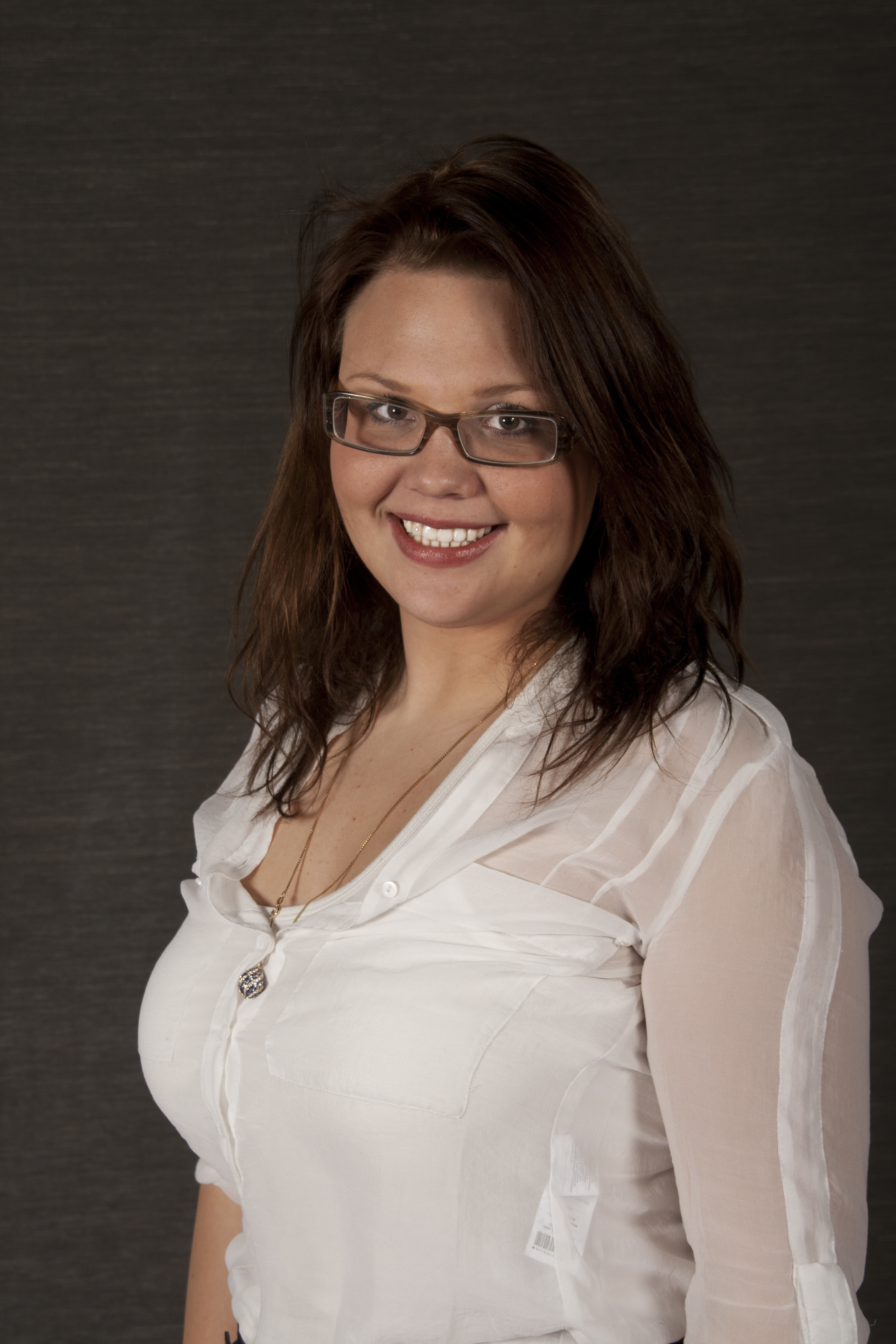 Caroline Lagergren, politiker